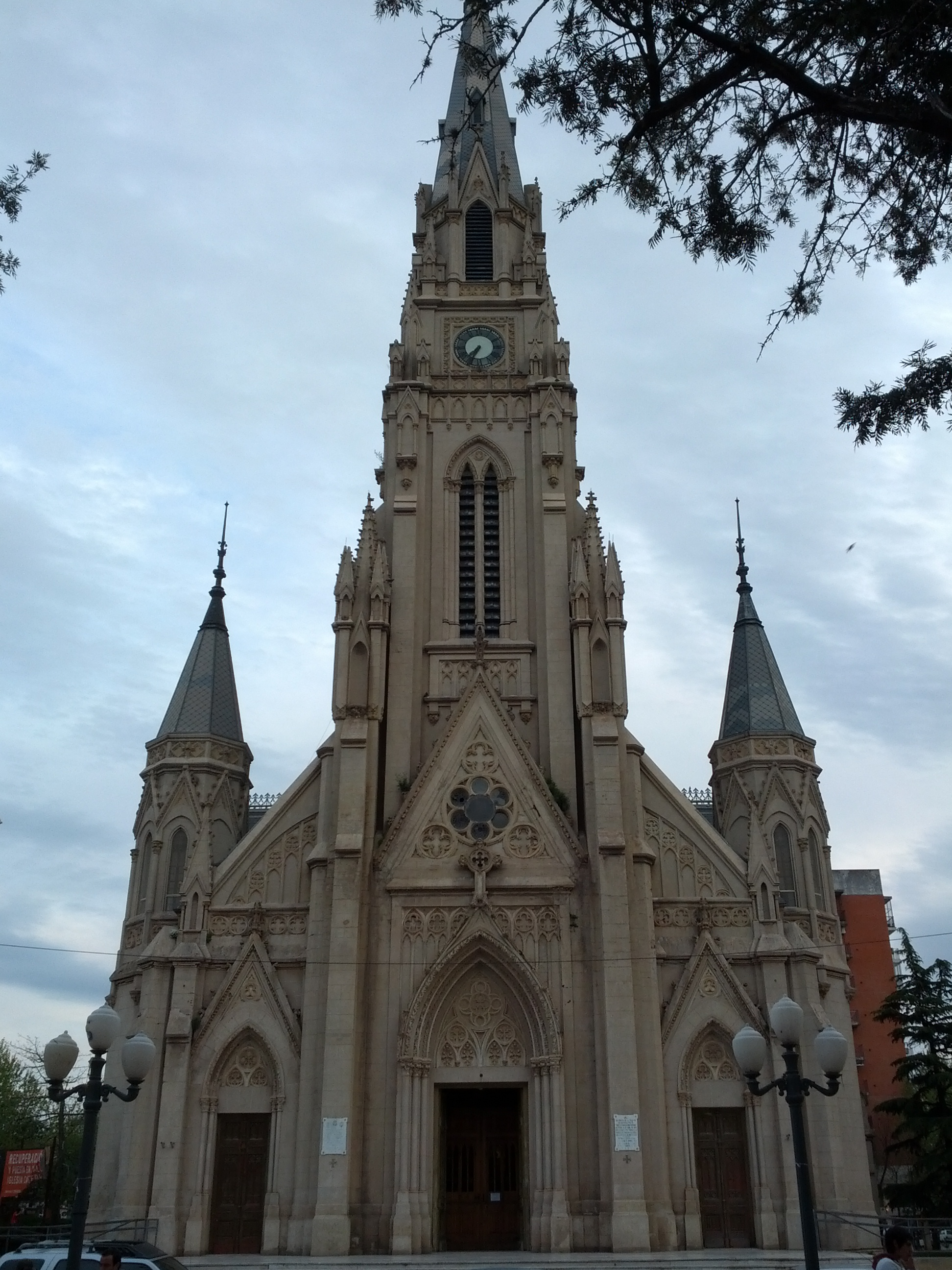 Catedral Basílica Nuestra Señora de las Mercedes